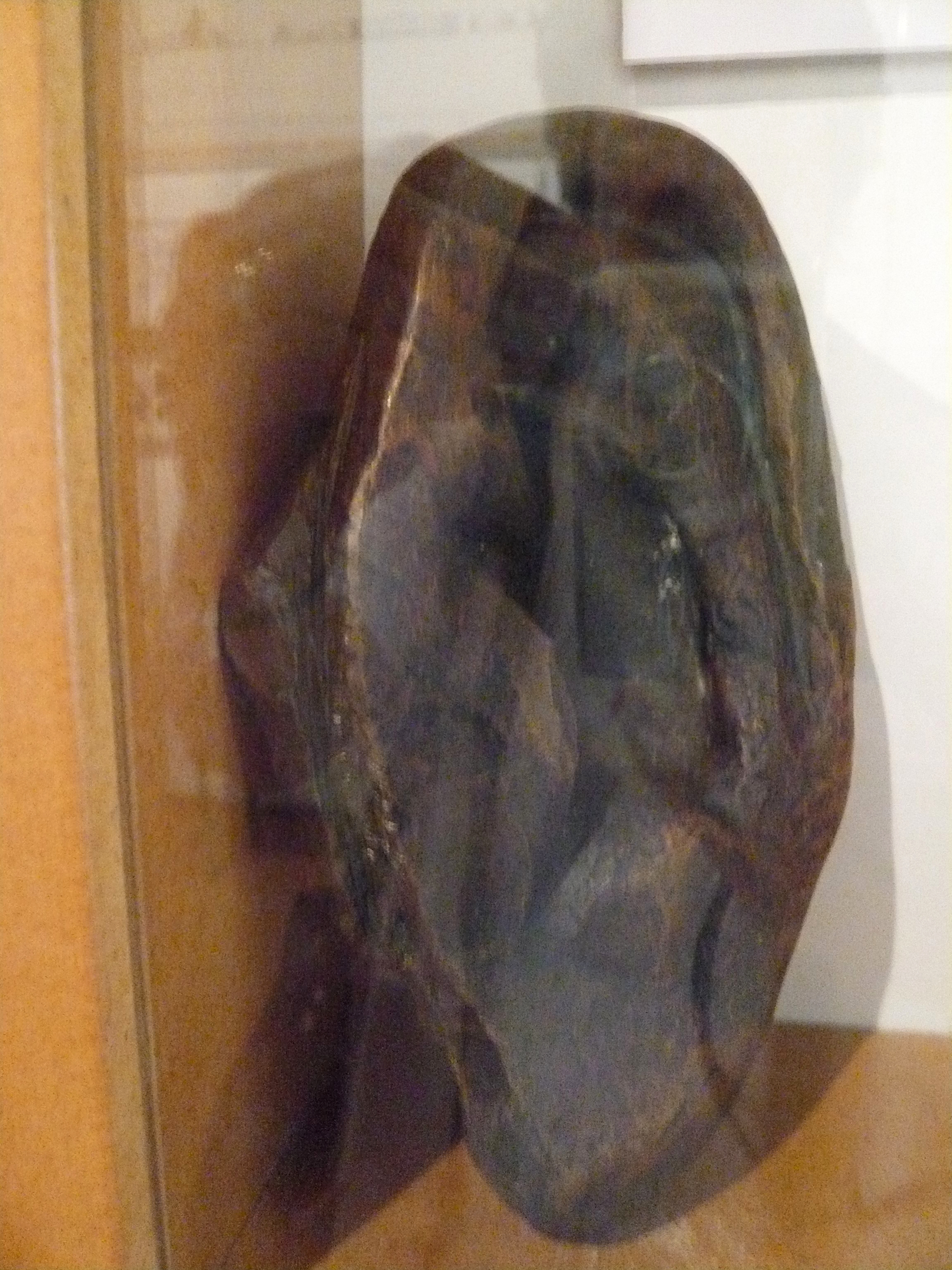 Originalstück (Ohr) des Berliner Stalindenkmals